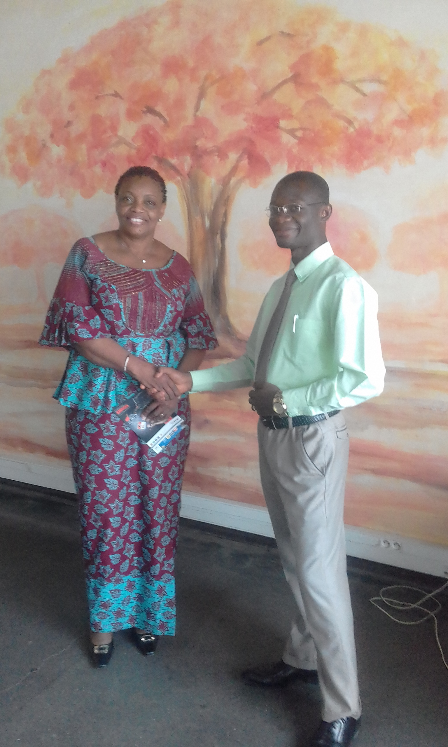 Nous sommes ici dans le salon d'honneur de l'agence tmb Kisangani